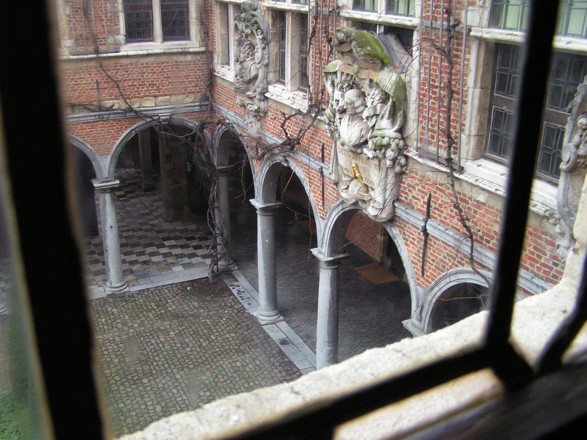 Plantin-Moretus Museum in Antwerpen (B)